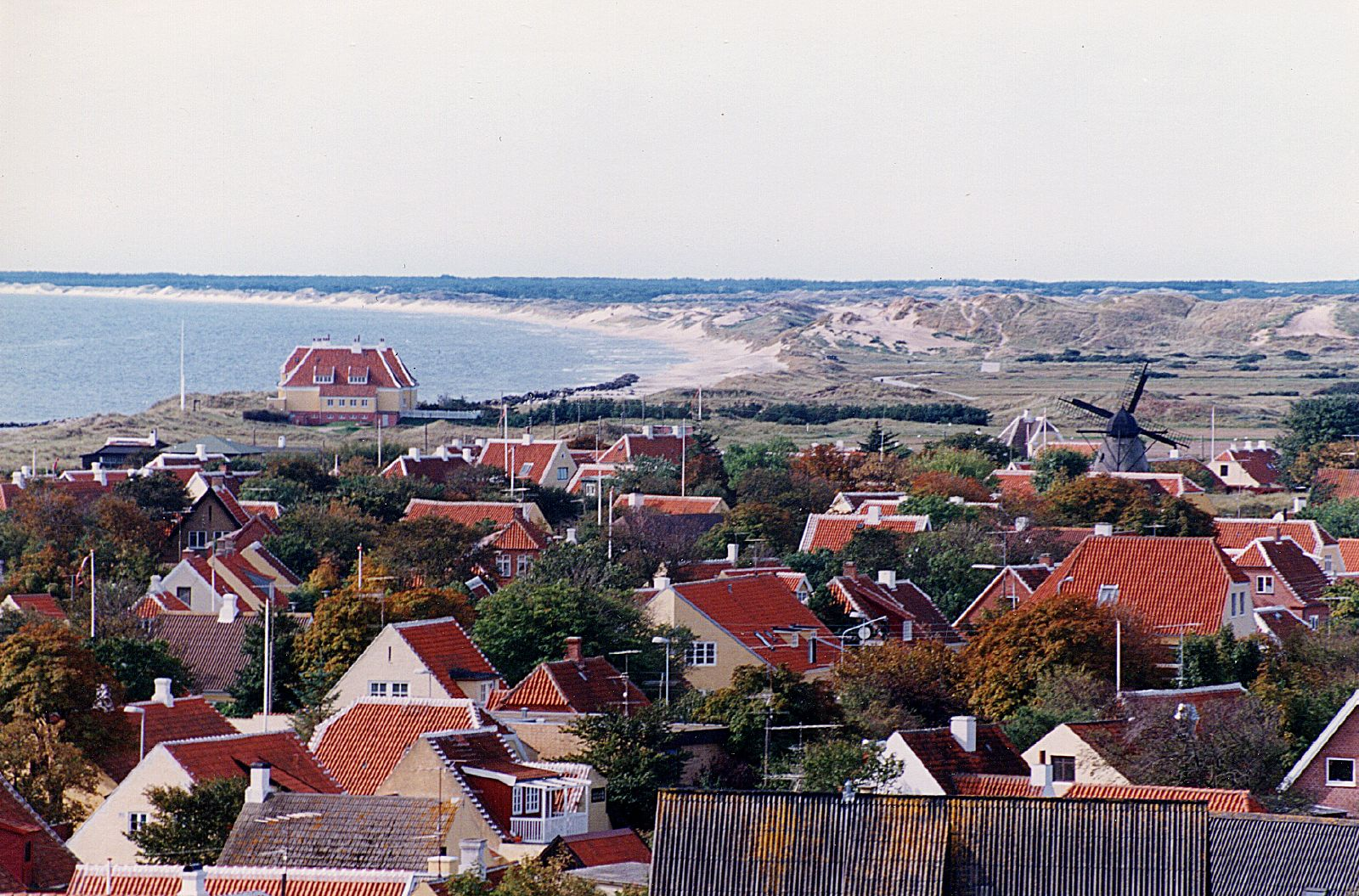 Rooftops and windmill in Skagen, Denmark